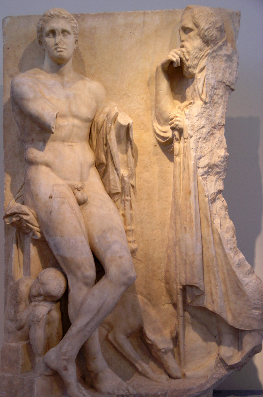 Stèle funéraire en marbre pentélique, trouvée dans le lit de l'Illissos à Athènes. Un jeune homme nu s'appuie sur un pilier, les jambes croisées. Il tient un lagobolon (arme de jet pour la chasse aux lièvres) dans la main gauche, indiquant qu'il est un chasseur, de même que le chien reniflant le sol derrière lui. À sa droite, son père âgé le regarde, frappé par le deuil, appuyé sur son baton. De petits trous sur le côté et au-dessus de la chevelure des personnages devaient être utilisés pour attacher des couronnes de métal. La représentation est complétée par le jeune esclave à demi endormi sur les marches, épuisé de douleur. La représentation du corps du jeune homme qui occupe l'espace par sa grandeur monumentale a dû être inspirée par la statue d'un héros. Ce monument qui avait originellement la forme d'un naiskos a été attribué au sculpteur parien Scopas ou à un sculpteur de son école. Vers 340 av. J.-C.